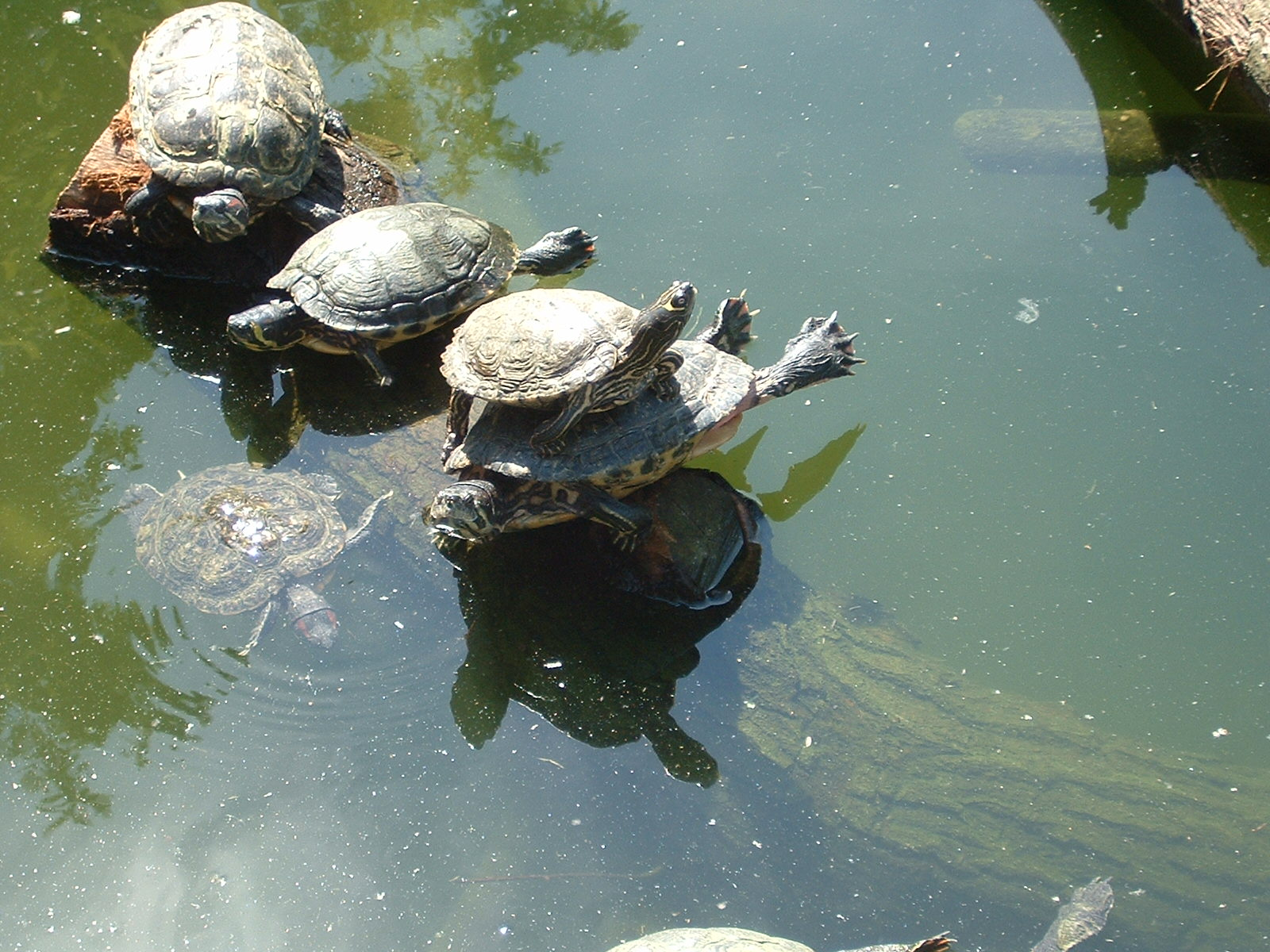 Schildkröten im Zoo Duisburg.